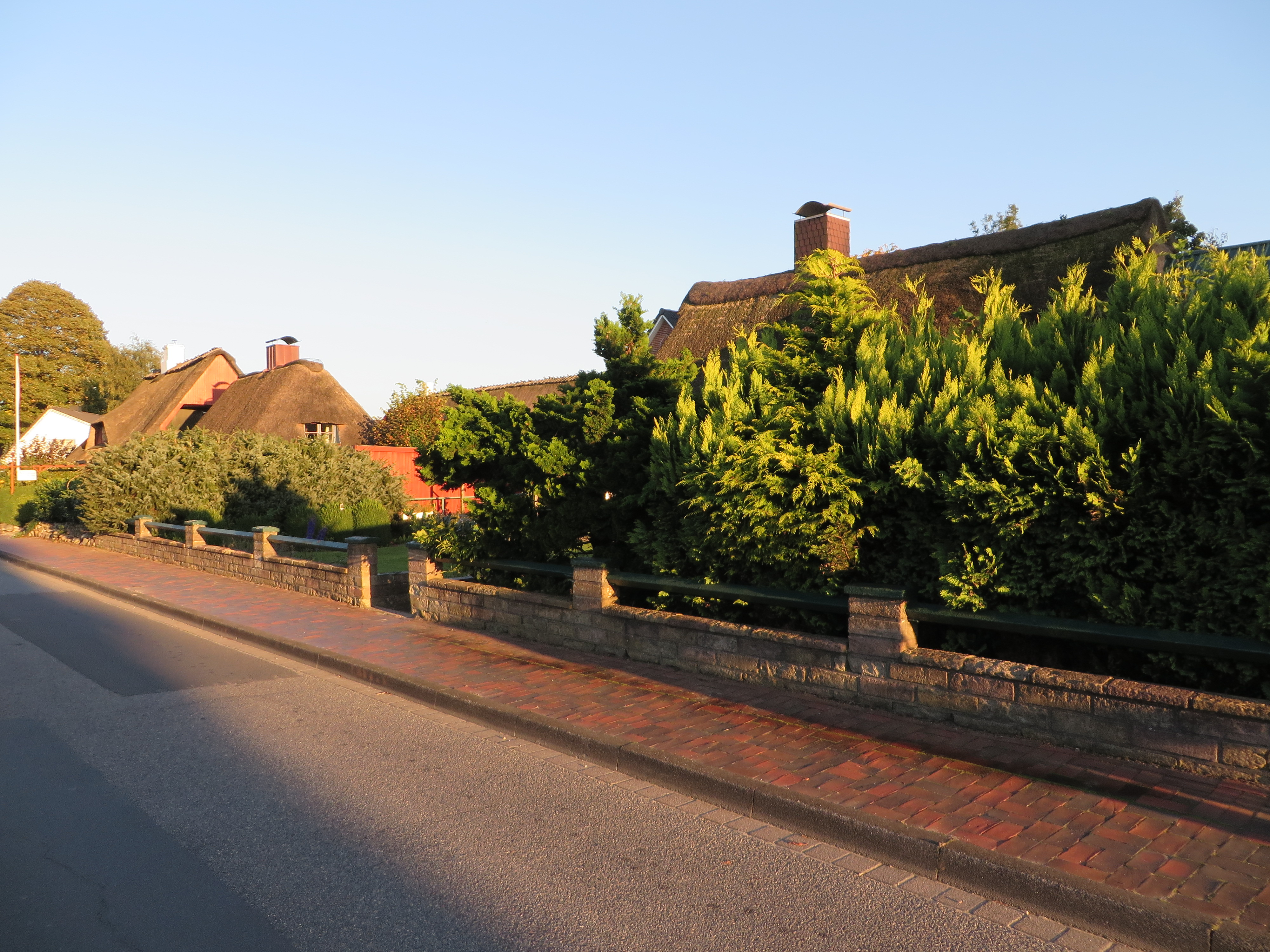 Reetdachhäuser in der Westerstraße 39 bis 33 (Harrislee September 2014), Bild 02